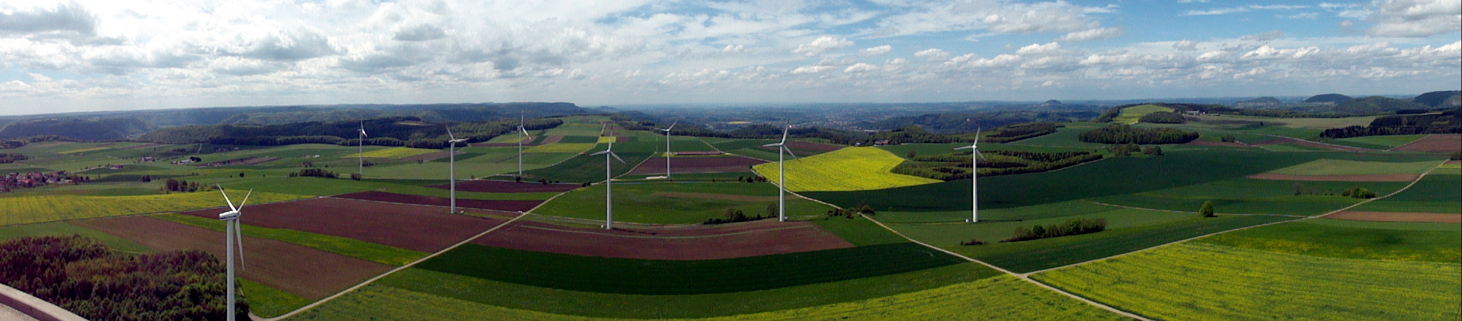 Sender Lauterstein 1 mit Vestas Windkraftanlage